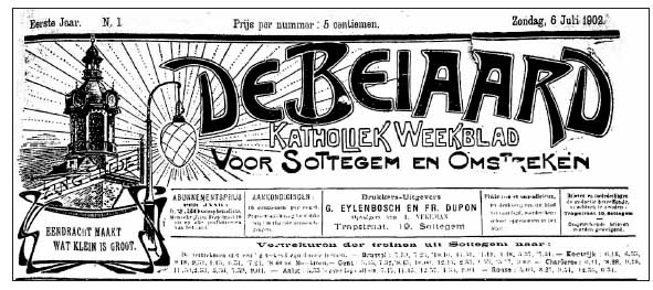 Eerste nummer van De Beiaard - Zottegem - Oost-Vlaanderen - Vlaanderen - België